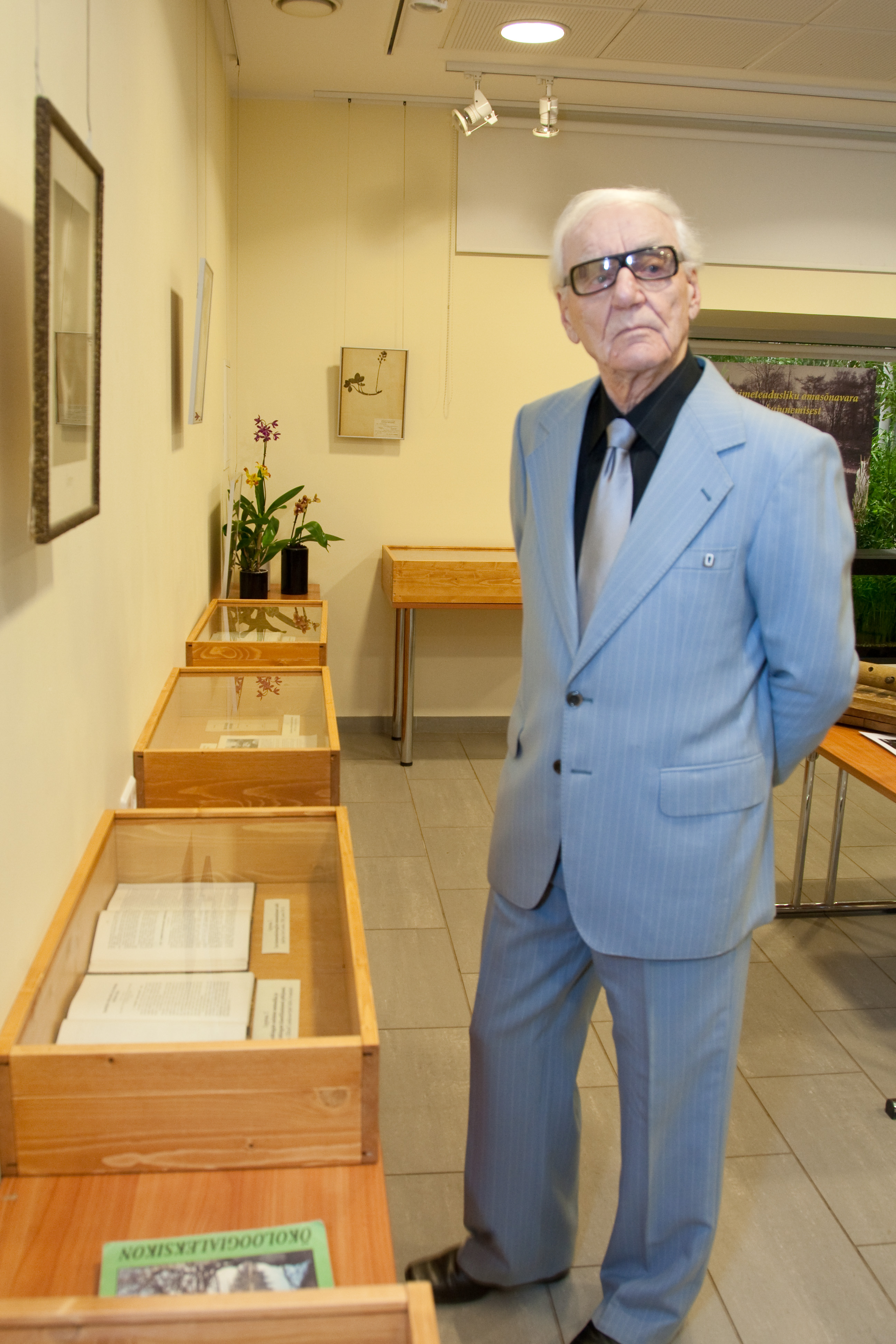 Rahvusülikooli 90. aastapäeva üritused. TÜ emeriitprofessor Hans Trass 24. novembri 2009 Tartu Ülikooli botaanikaaias näituse "Eestikeelse botaanika algus ülikoolis" avamisel.